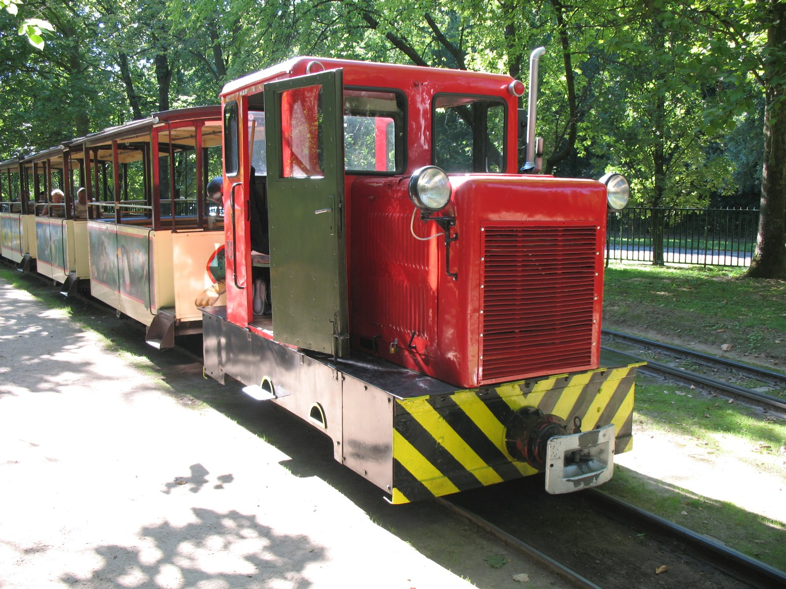 Ez a kép a debreceni állatkertben található kisvasutat ábrázolja előlről.